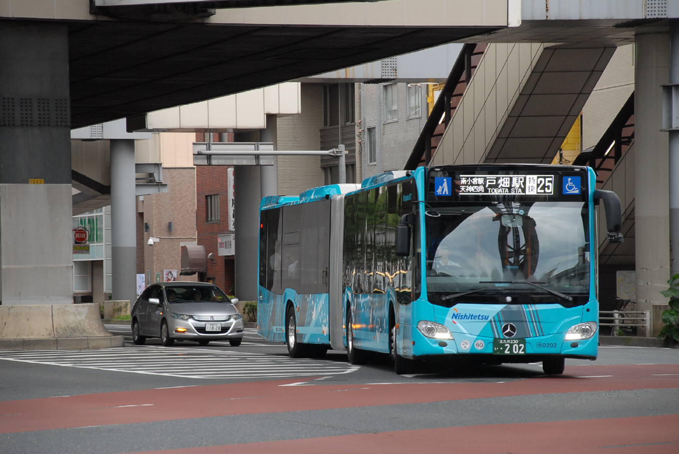 三萩野交差点にて撮影